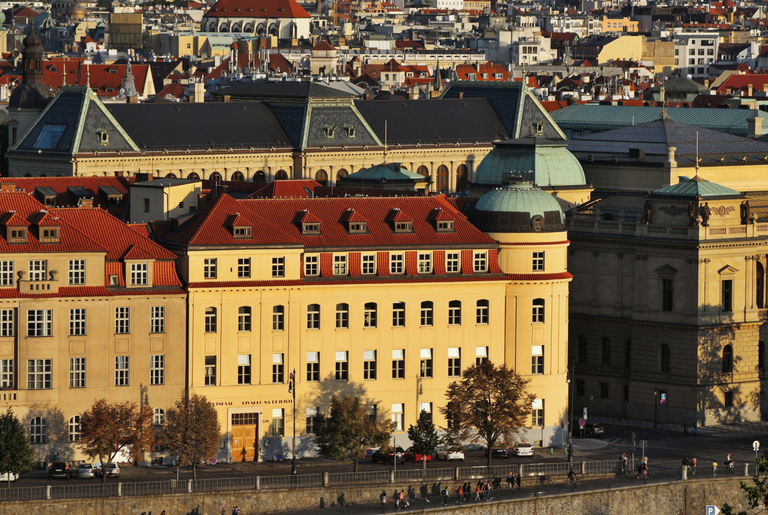 Pohled na Staré Město z Letné